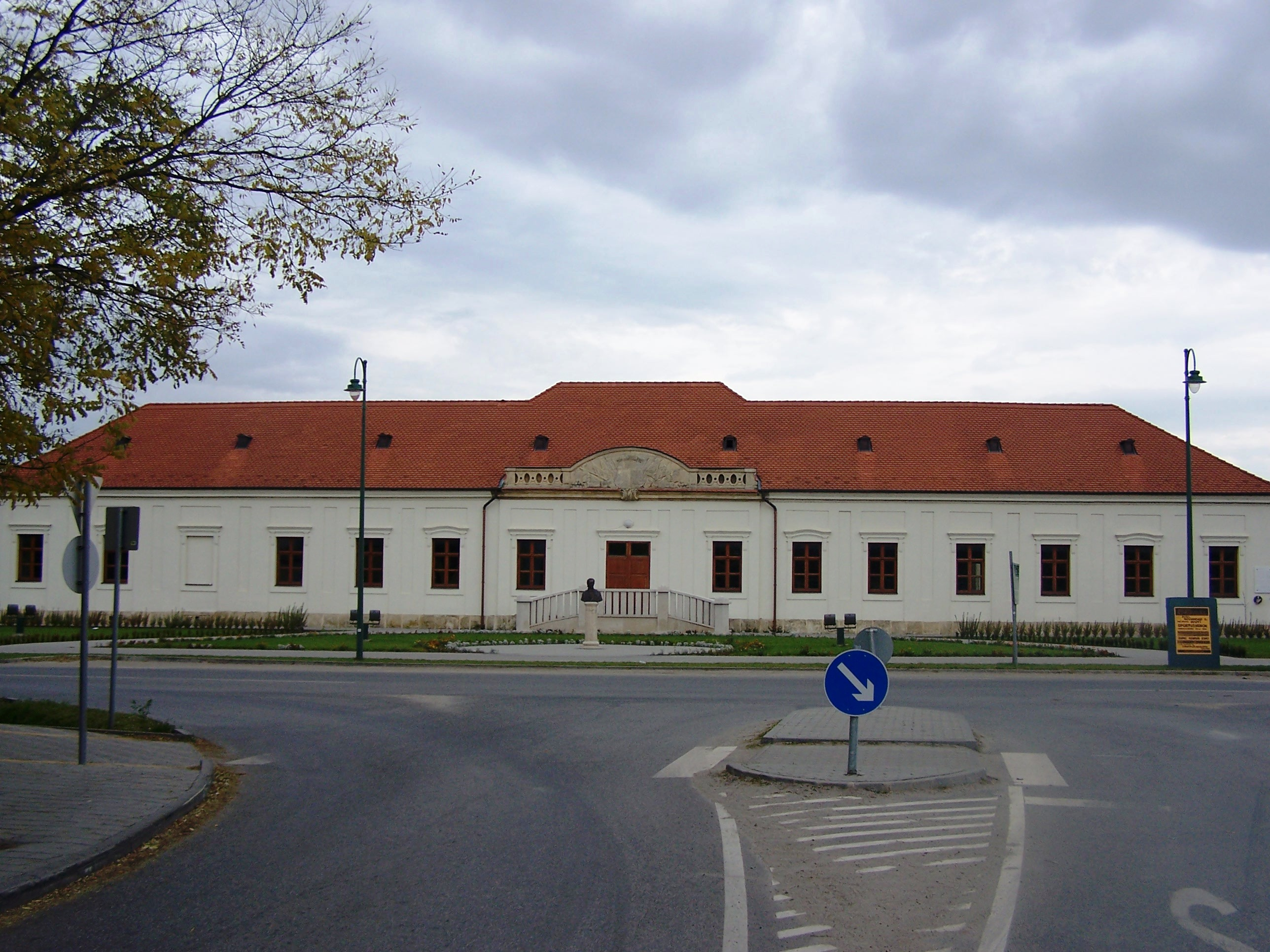 Beleznay-kastély (Bugyi, Beleznay tér 3.) This is a photo of a monument in Hungary. Identifier: 11717